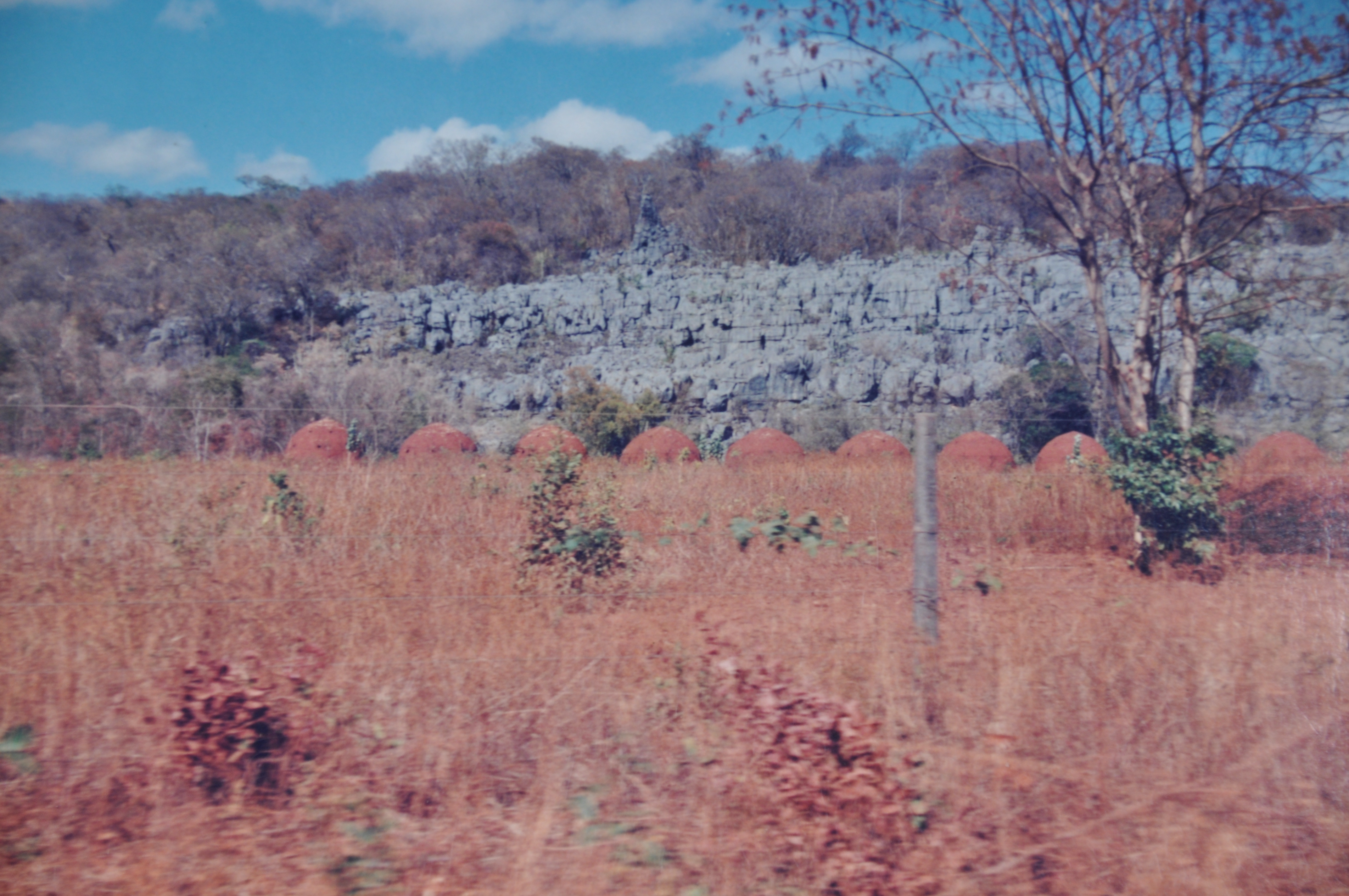 paredão com forno